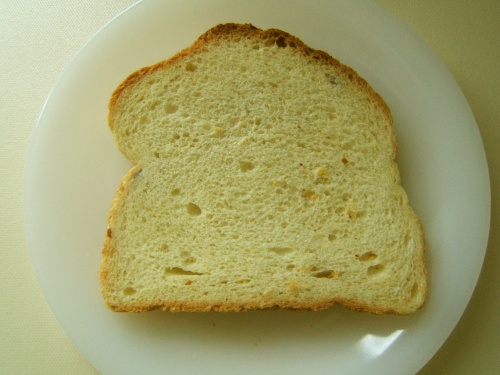 Maïsbrood